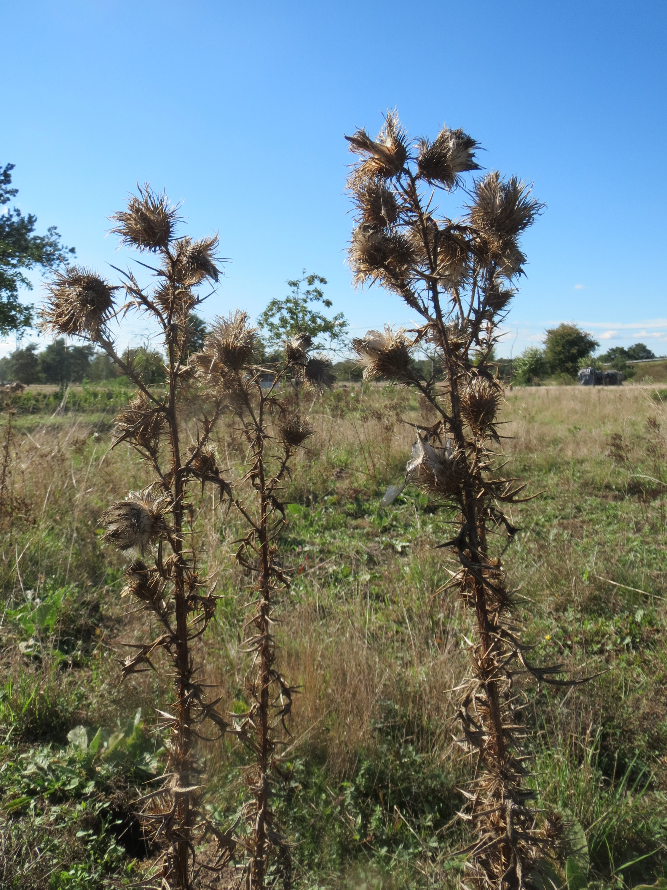 Gewöhnliche Kratzdistel (Cirsium vulgare) am Rand vom Naturschutzgebiet Gewann Frankreich-Wiesental